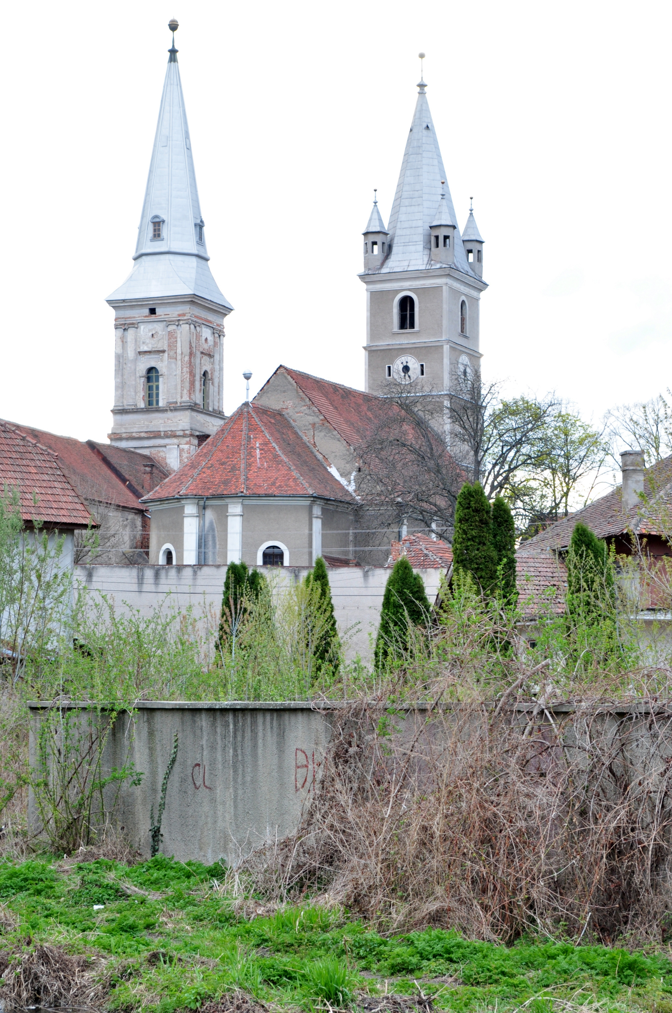 Biserica luterană